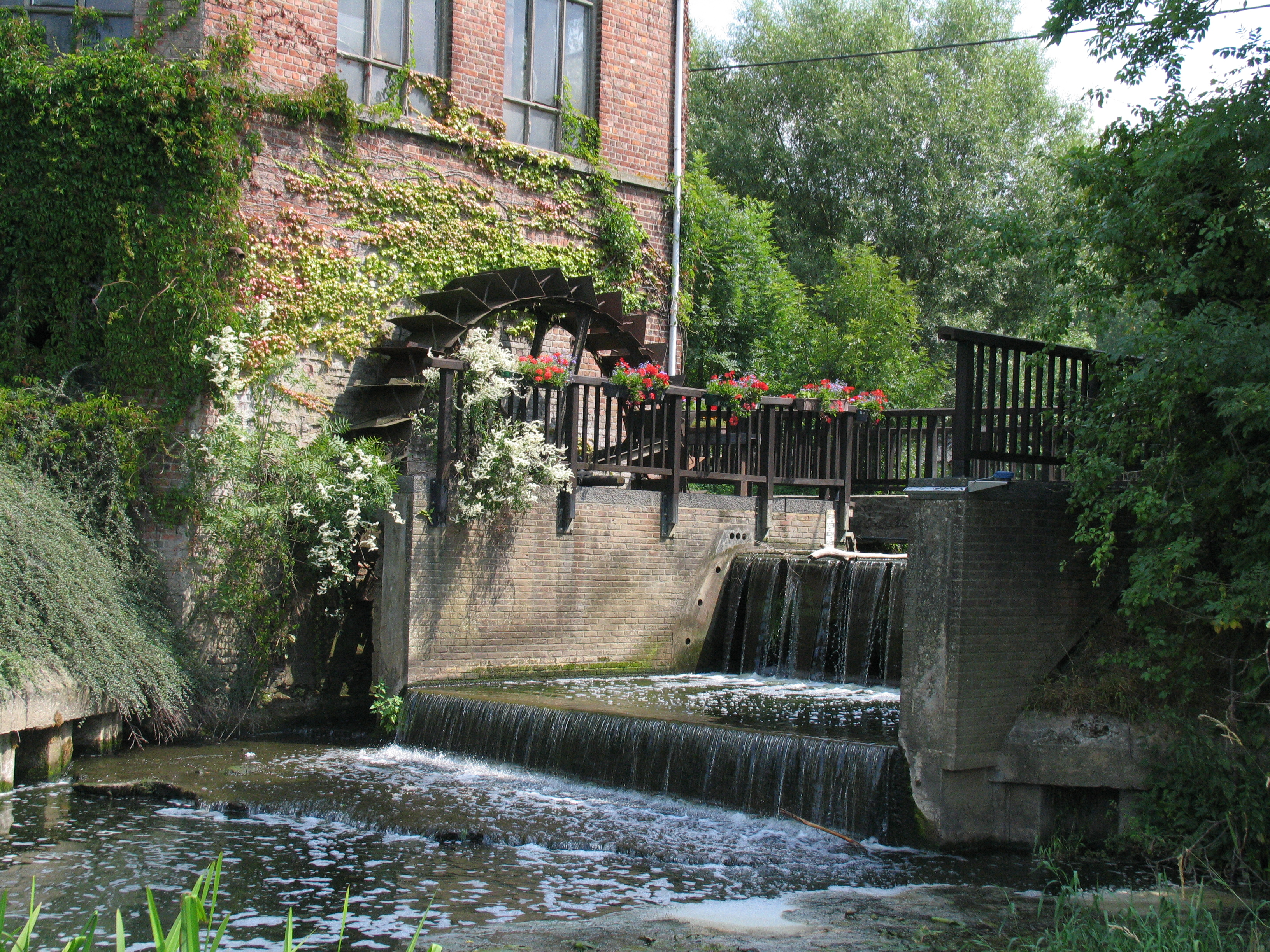 Galmaarden - Tollembeek - Munkbaan 2 - Heetveldemolen This photo of immovable heritage has been taken in the Flemish Region